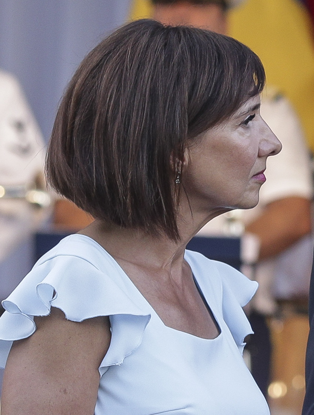 100 Years Of Friendship. A fost tema recepţiei de Ziua Independentei, când am sărbătorit împreună independenţa Americii, centenarul unităţii României şi prietenia dintre SUA şi România. Am avut lângă noi distinşi oaspeţi, prieteni dragi şi curajoşi, care nu s-au speriat de furtună şi au rămas alături de noi, pentru ca în final să fim binecuvântaţi cu un curcubeu superb. Mulţumim, România! 🇷🇴🇺🇸❤️ Octav Ganea / Inquam Photos --- 100YearsOfFriendship #July4th #IndependenceDay #ZiuaIndependentei #Bucharest #Bucuresti #Romania